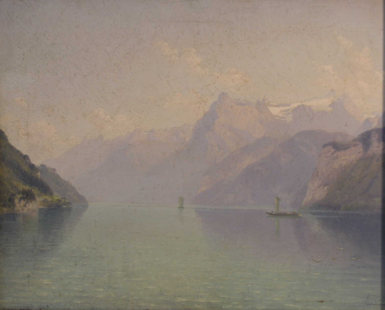 Gemälde von Ernst Hodel Senior